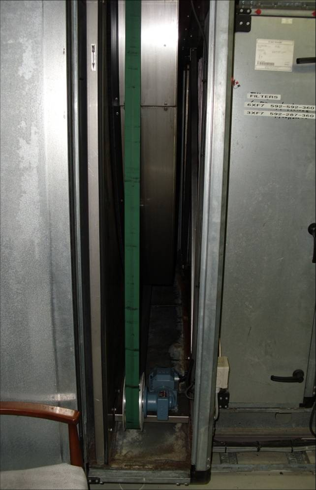 Wärmerad zur Rückgewinnung thermischer Energie in Klimaanlagen